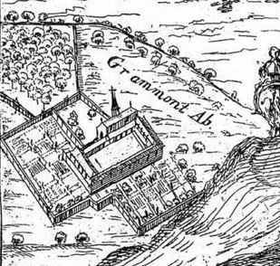 Abbaye de Grammont